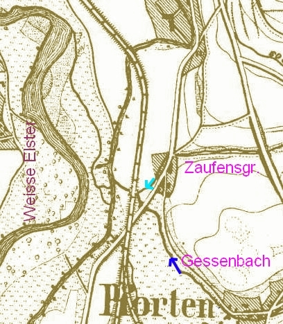 Der Mündungspunkt des Zaufensgraben in den Gessenbach.